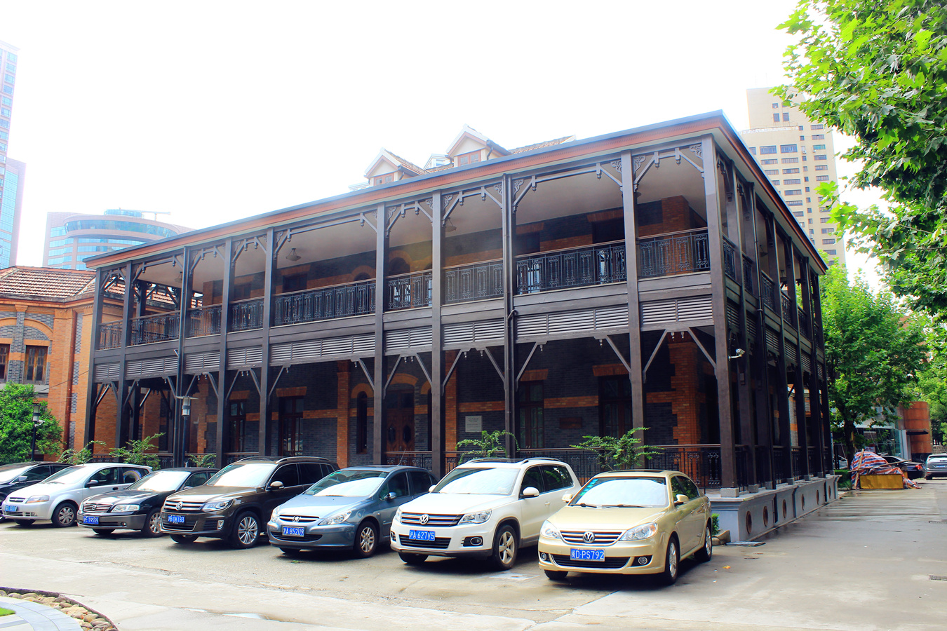 中文（中国大陆）: 熊佛西楼（上海戏剧学院）